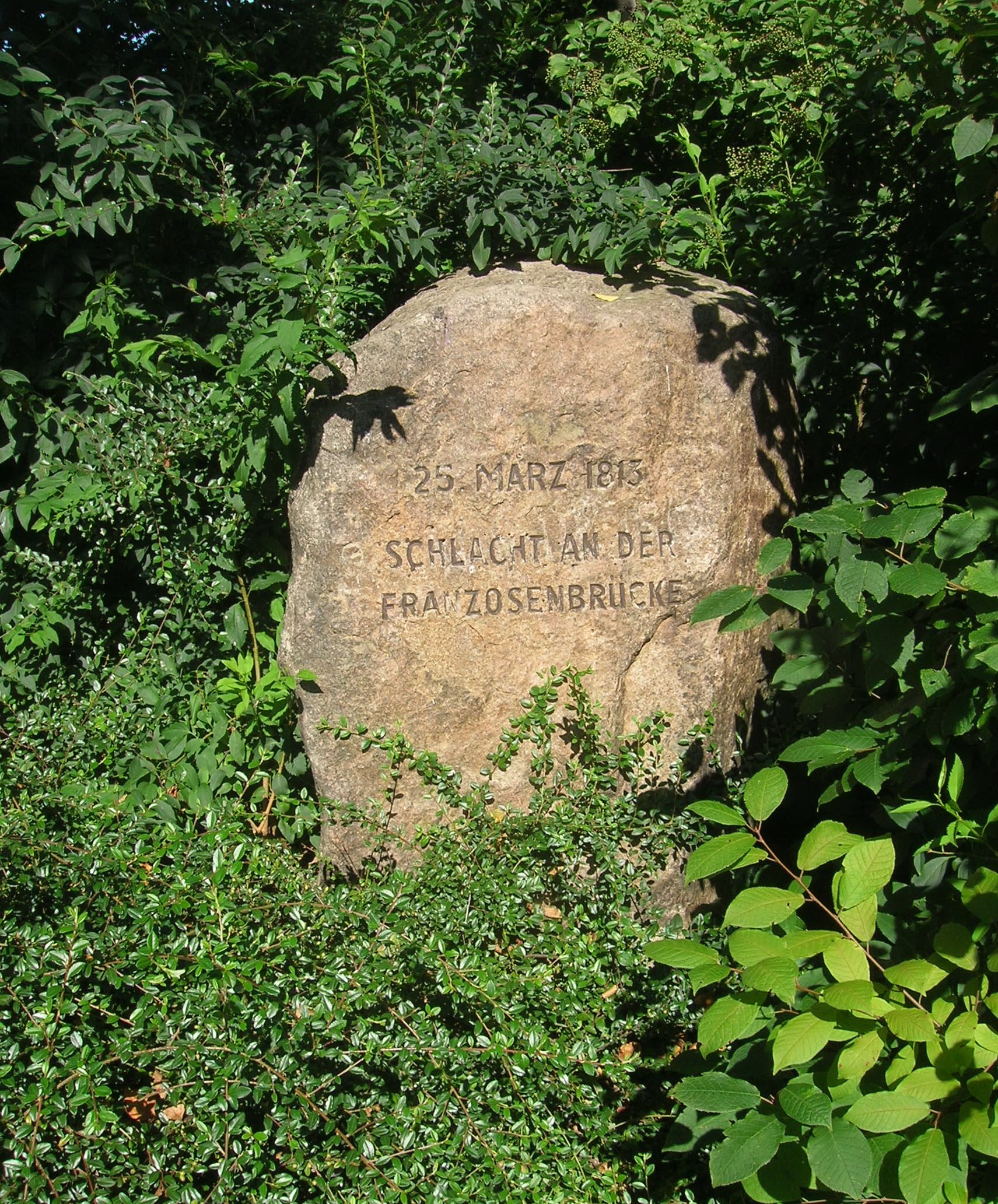 Sog. Franzosenstein von 1913 in Bremerhaven zur Erinnerung an eine verlorene Schlacht im 4. Koalitionskrieg (1813)